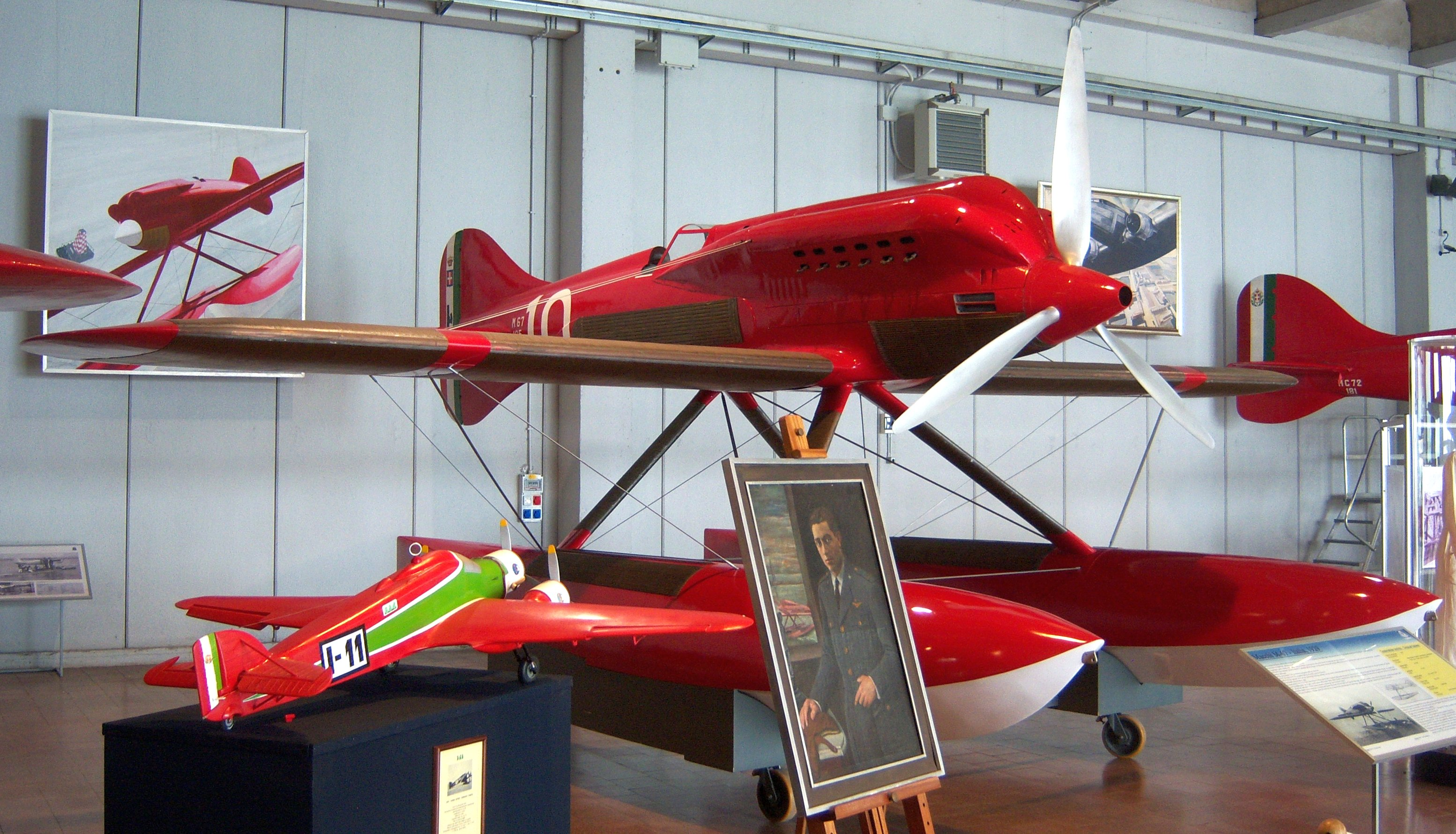 Macchi M.67 im Museo storico dell'Aeronautica Militare di Vigna di Valle